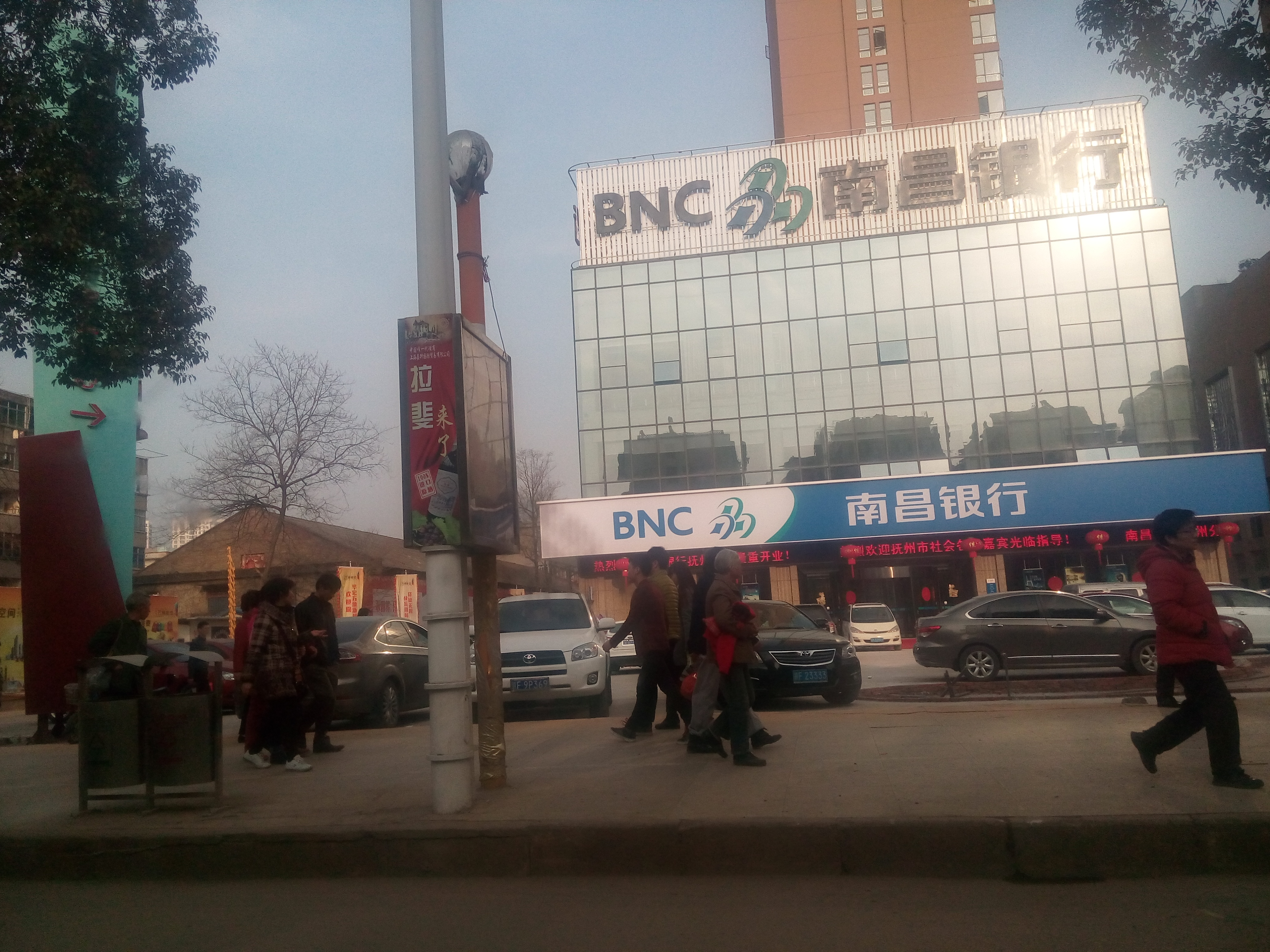 南昌银行抚州分行